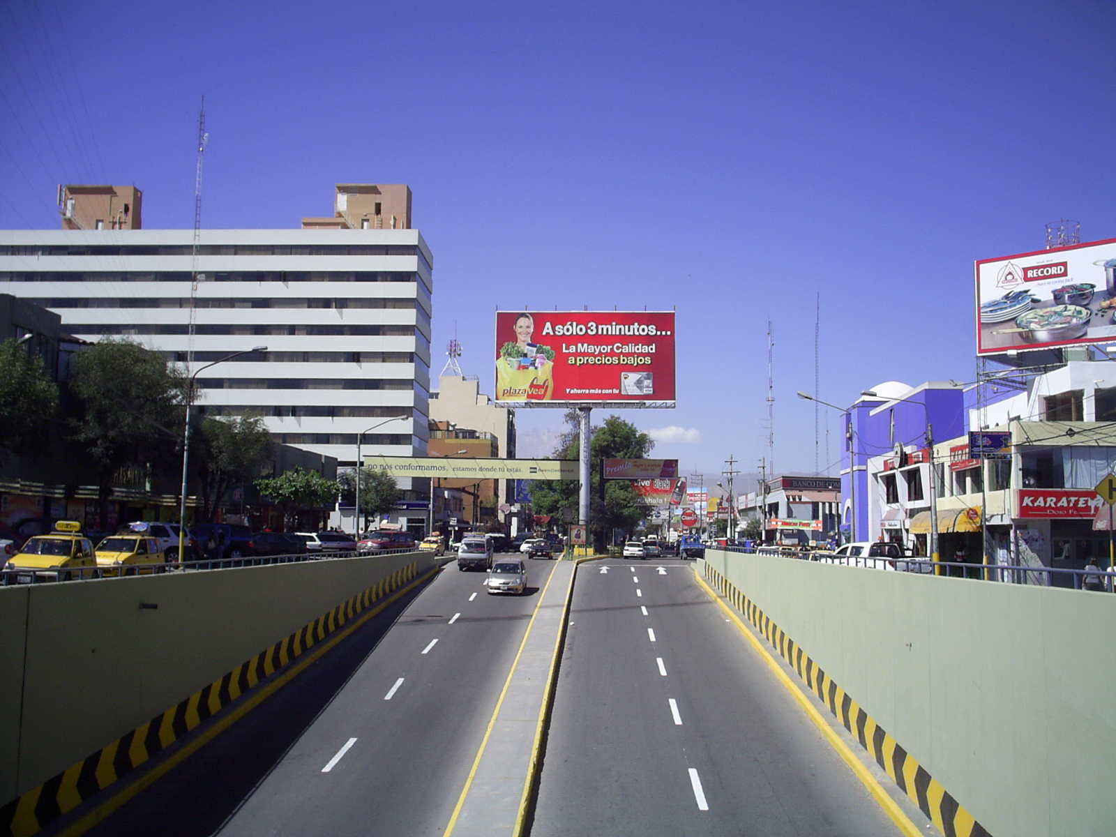 Sector Oeste de la Av. Ejercito que une, con la prolongacion de esta une los distritos de Cerro Colorado, Cayma, Yanahuara y Arequipa.